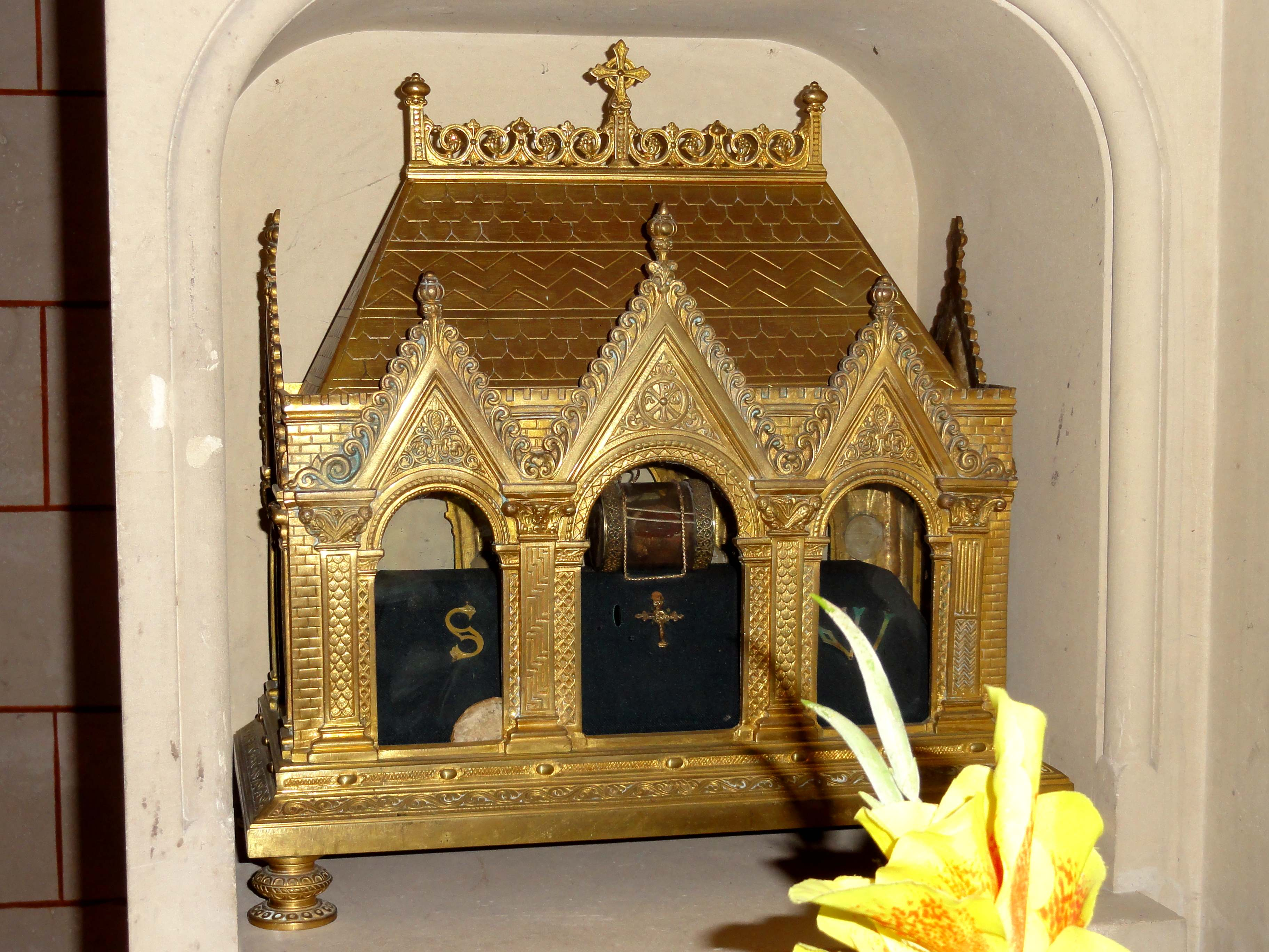 Châsse de sainte Waudru de Mons (représentée également sur un vitrail de l'église).